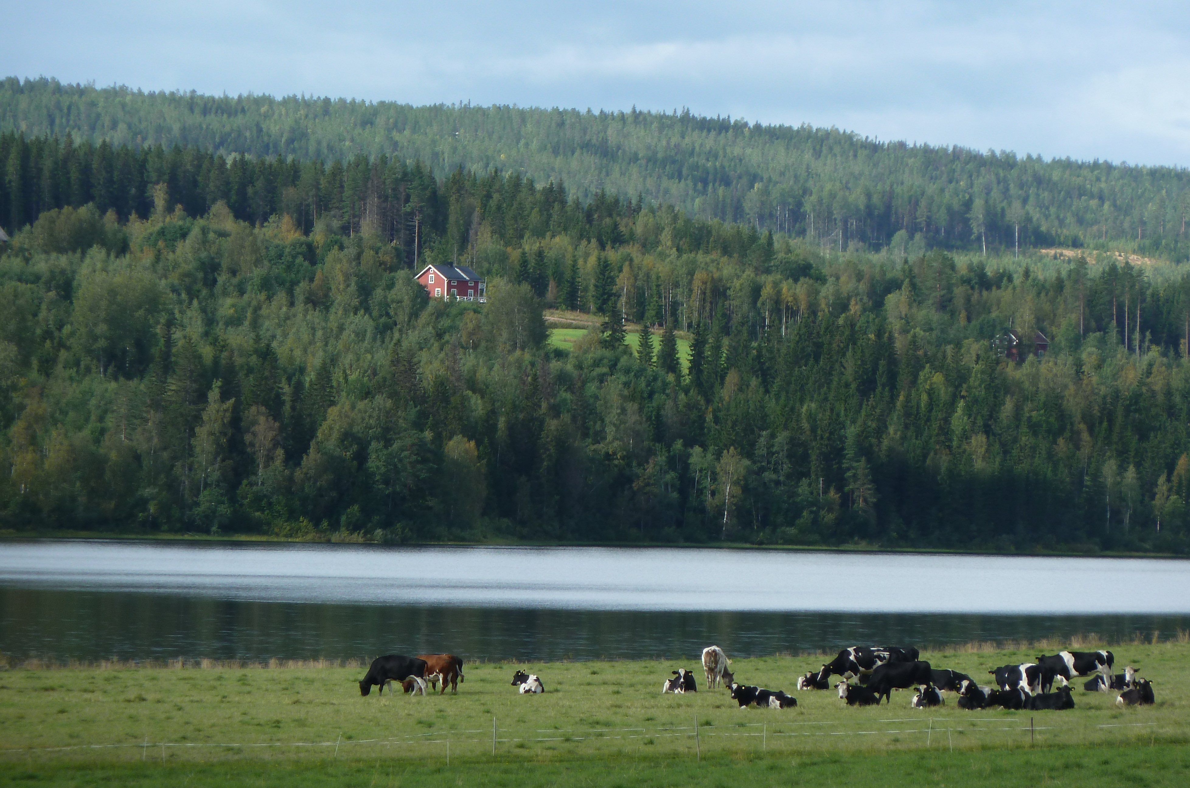 Gensjösjön, Örnsköldsvik. Schweden.